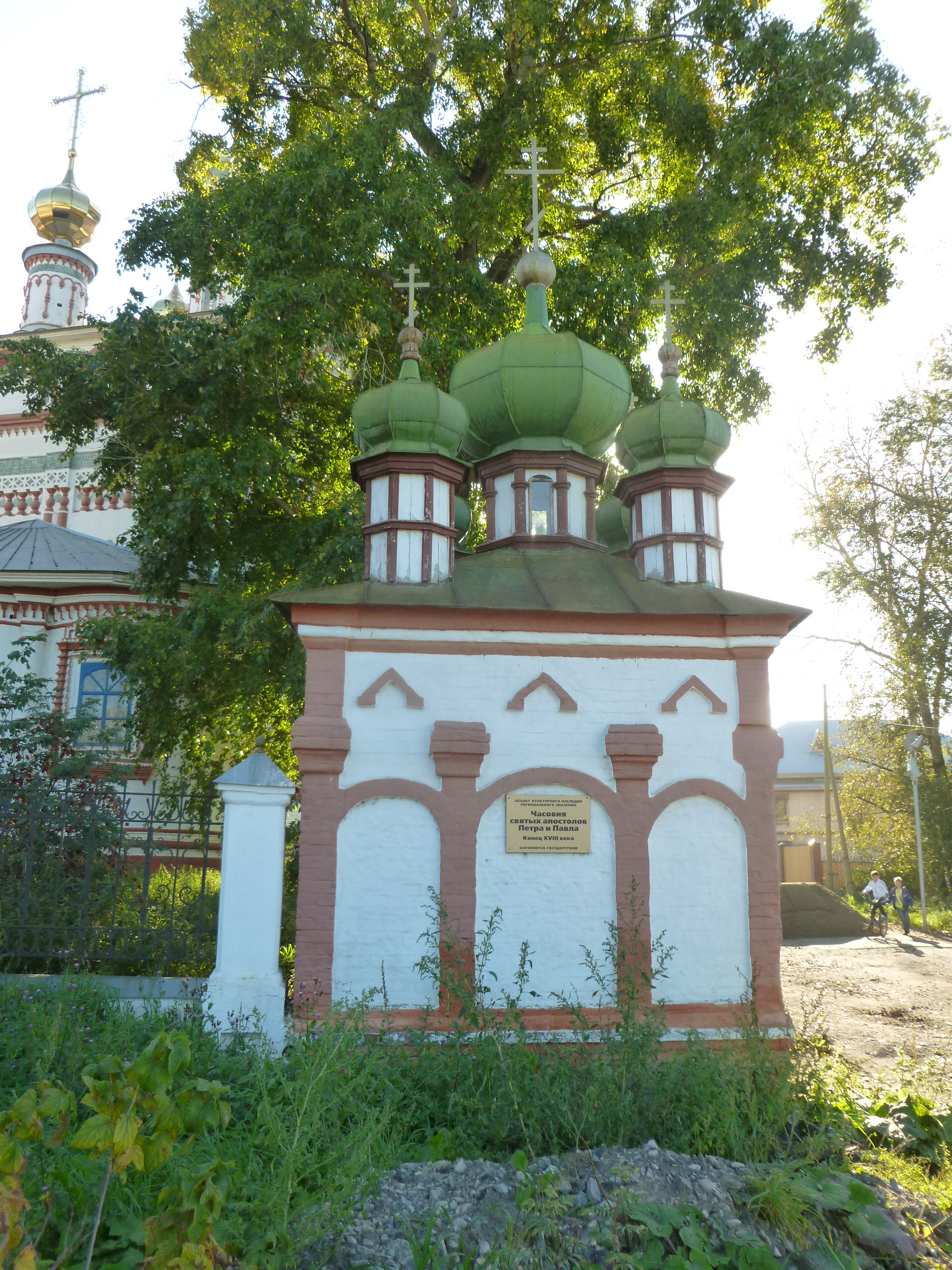 Объект культурного наследия. город Соликамск